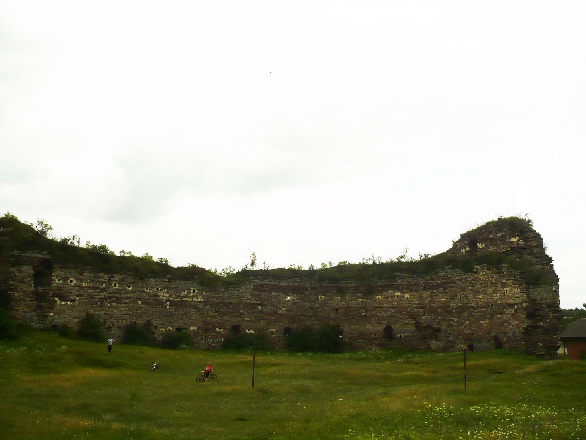 Buczacz. Zamek